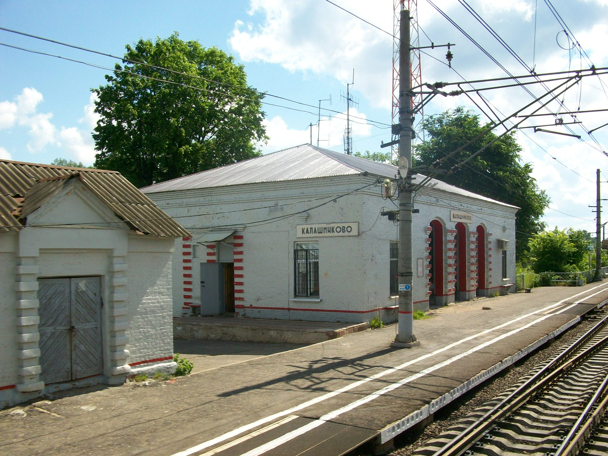 Станция Калашниково